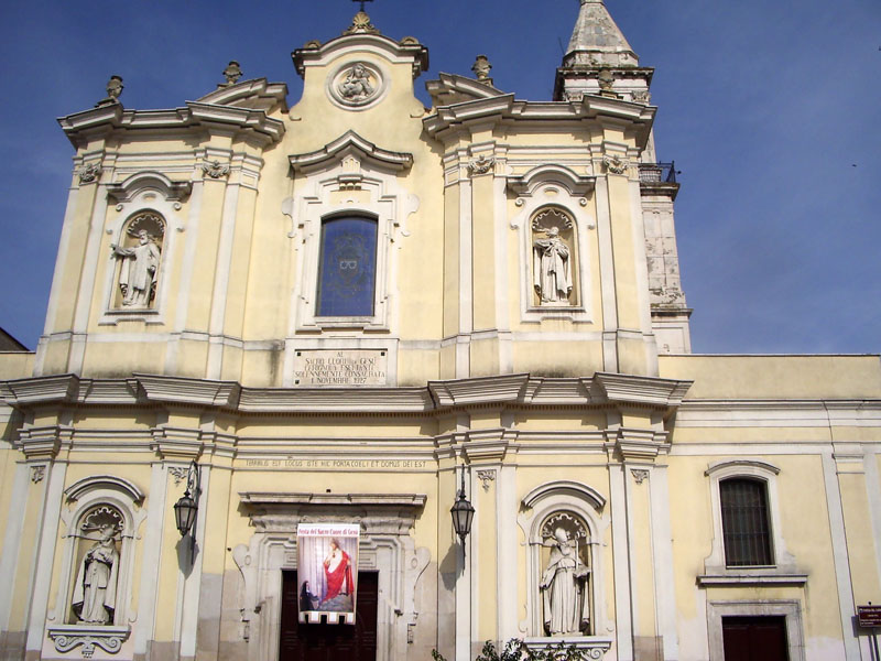 Facciata della Chiesa della Madonna del Carmine.